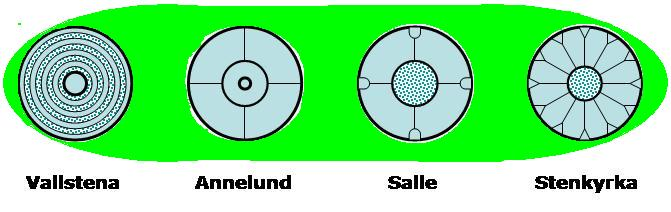 Radgräber